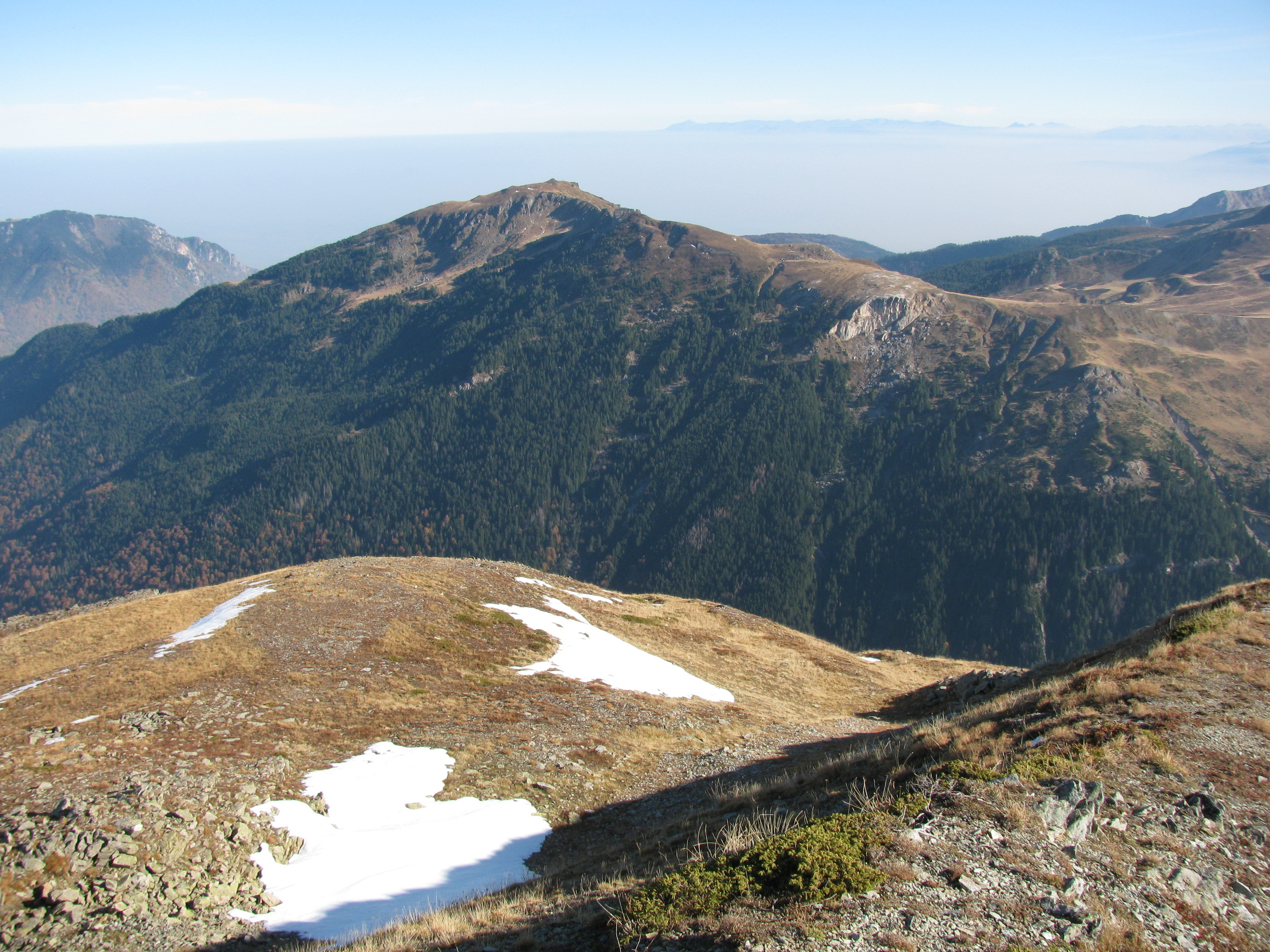 Maja e Ropsit, Deçan